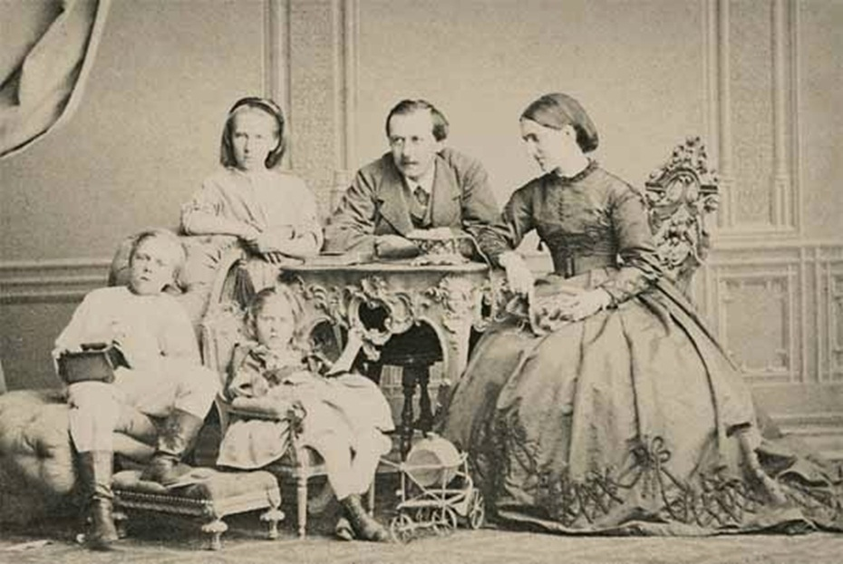 Граф Павел Андреевич Шувалов с женой Ольгой Эсперовной и детьми